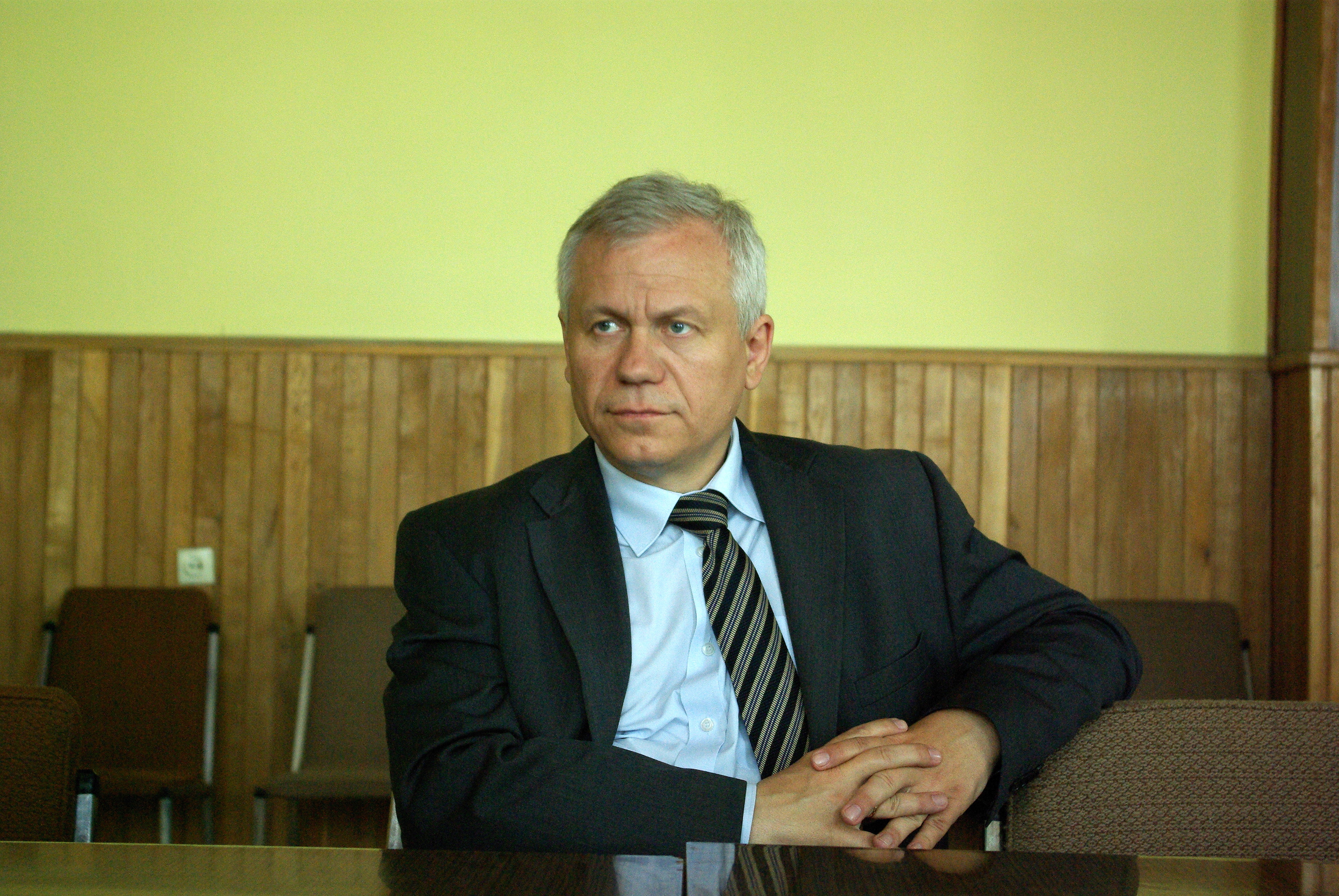 Marek Jurek podczas spotkania z wyborcami w Zagórzu 30 maja 2088